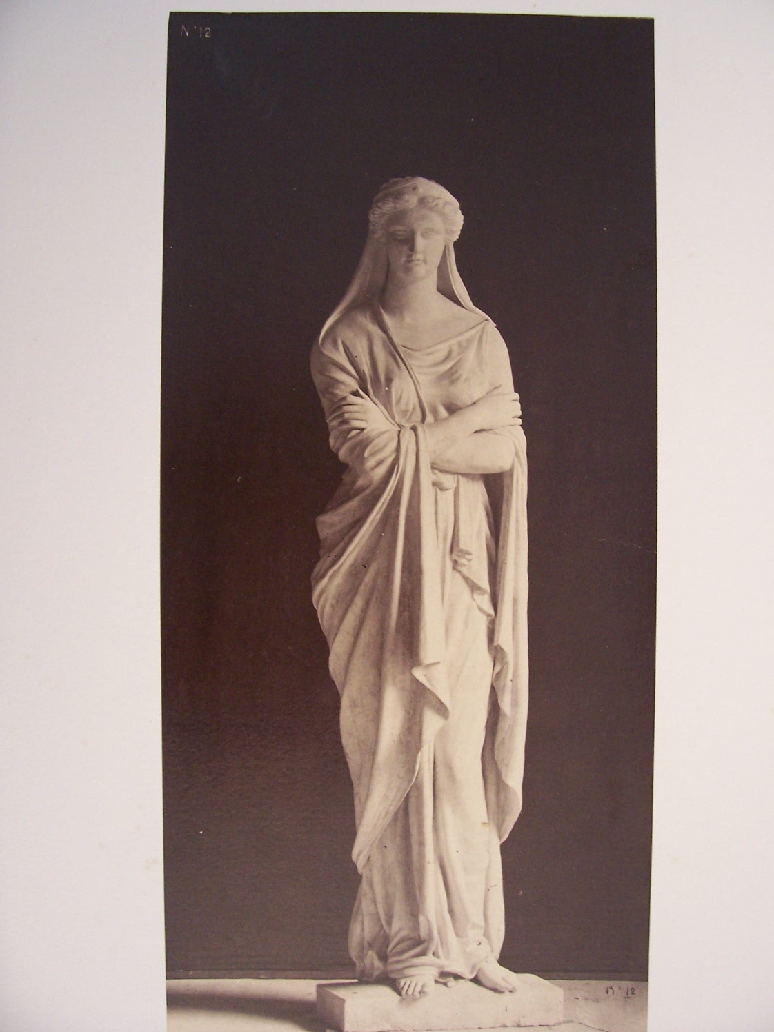 Le Nouvel Opéra de Paris. Statues décoratives (35 planches) Statues dans le Grand Foyer: Planche 12: La Dignité (par Félix Sanzel)